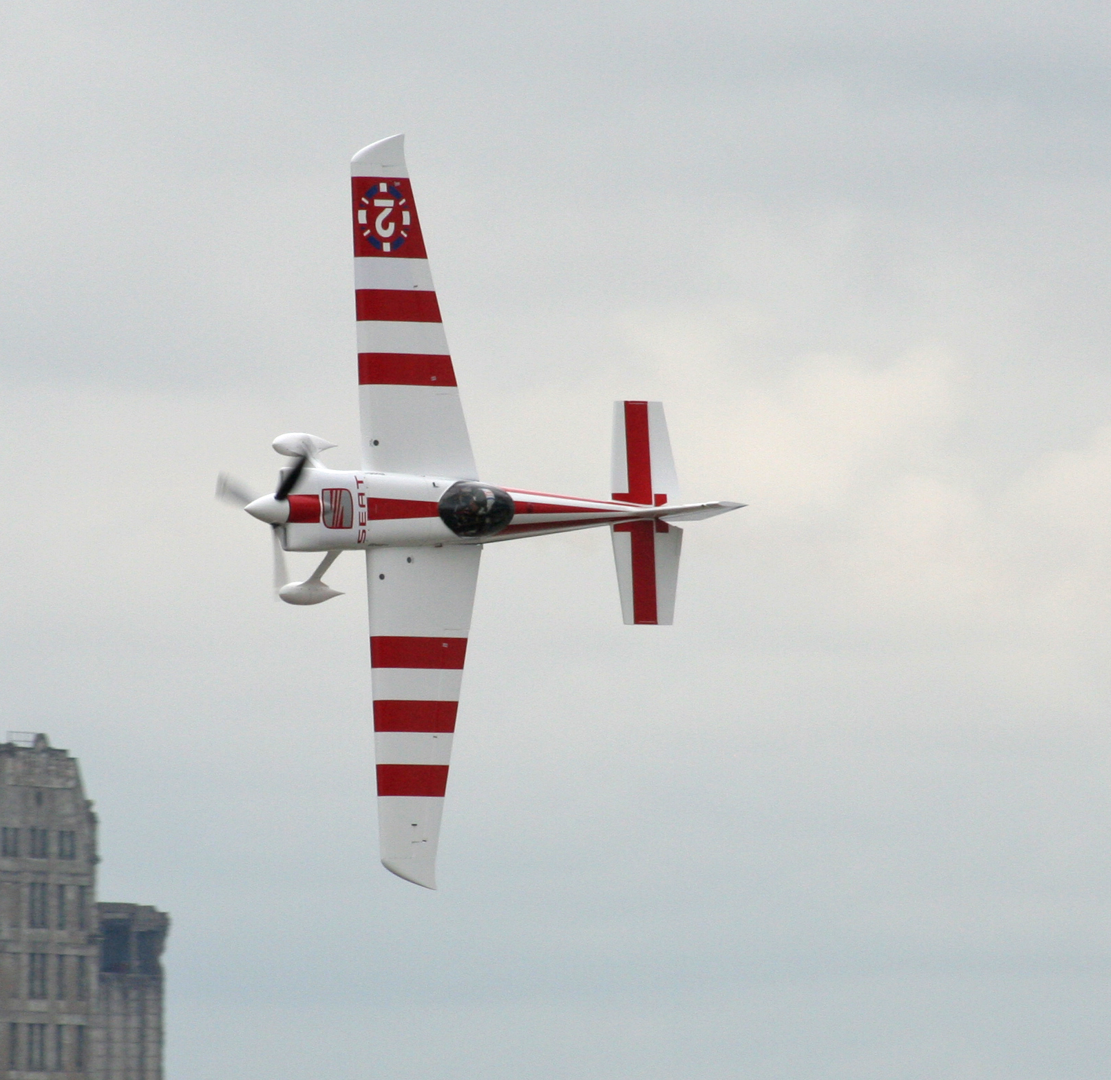 Paul Bonhomme 1